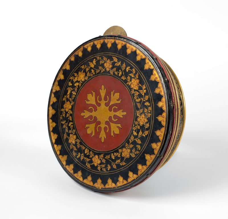 Slaginstrument. Lijsttrom uit Palembang, Zuid-Sumatra. De redep, of redap, is onderdeel van het kelintang ensemble in het zuiden van Sumatra. Hij wordt samen met de kelintang (vier, vijf, zes, zeven, of negen horizontale bronzen of ijzeren gongs), een cilindrische trom (gendang panjang) en een hangende gong bespeeld. Soms worden de horizontale gongs vervangen door een hobo-achtige dubbelriet (serunai) of viool. De combinatie van gongs met een viool en lijsttrom verenigt elementen van boeddhistisch-hindoeïstische, Portugees-Maleise en West-Aziatische, Arabische oorsprongen (Kartomi, 1998:624). West-Aziatische muziek beinvloedde Zuid-Sumatra sinds begin 16de eeuw, toen een Moslim sultanaat van gemengd Javaans en Aarabisch bloed in Palembang regeerde. De Tari Dana, de 'donatie-dans', is een van de dansen waar de redep bij gebruikt wordt. In de streken rond Lahat en Pagaralam voeren meisjes en jongens deze dans uit. Ze knielen of staan in gescheiden rijen, bewegen ritmisch heen en weer en zingen gelijkertijd over islamitische wetten en voorschriften, terwijl ze de redep en een rammelaar hanteren (id. 625). Deze dans wordt ook geleerd op islamitische scholen. De redap wordt ook bespeeld met grotere lijsttrommen (redok) tijdens Moslim ceremoniën of solo door een zanger van Talibun poëzie (een oude vorm van poëzie met een specifieke rijm). Vanwege de vele invloeden van buitenaf is de Sumatraanse muziekcultuur zeer divers. De bewoners en culturen van elke regio aan de kust hebben een unieke mix aan pan-Maleise stijlen en repertoires, hoofdzakelijk vocaal. De binnenlandse culturen en westelijke eilanden hebben redelijk zelfstandige eigen muziekculturen (id. 623). De redep heeft kleuren die typisch voor Palembang zijn: rood, goud en zwart. . Lijsttrom Unknown language: Redep ; redap